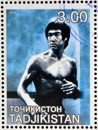 Bruce Lee